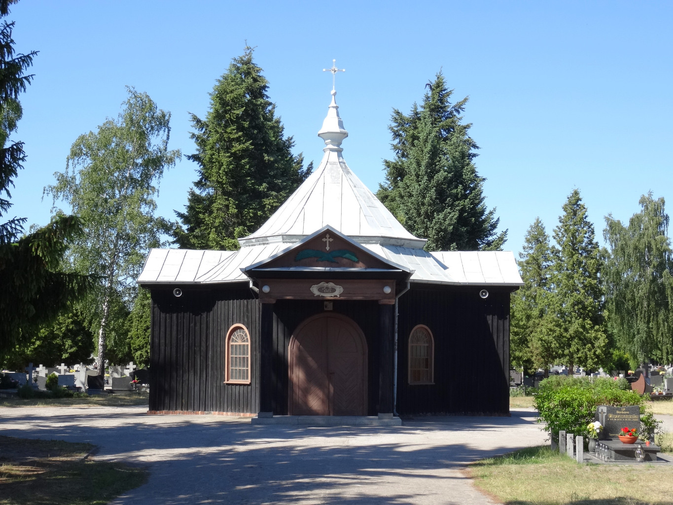 Drewniana kaplica na cmentarzu Najświętszego Serca Pana Jezusa w Bydgoszczy (1929)